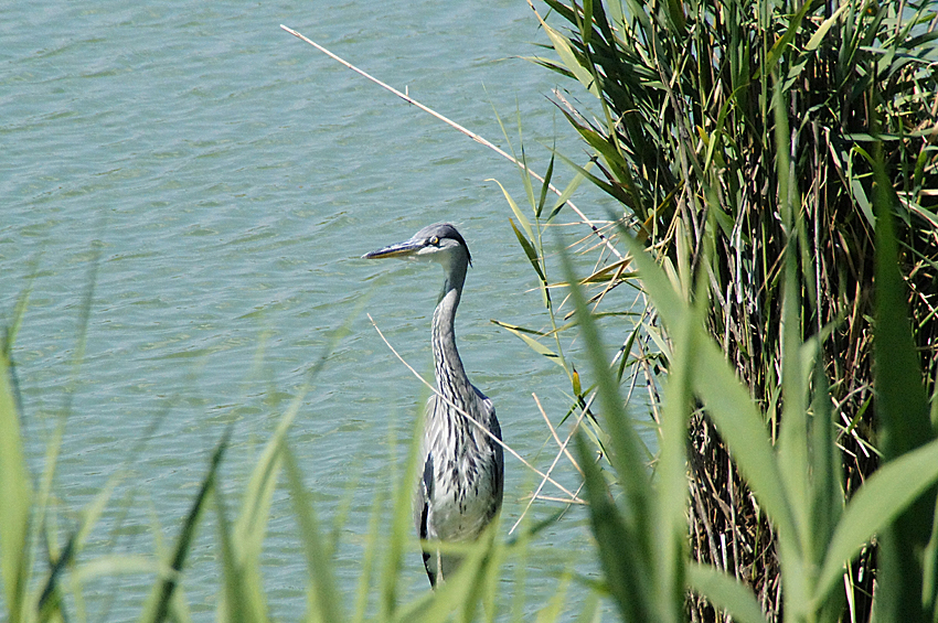 Ripa Bianca di Jesi This is a photo of a monument which is part of cultural heritage of Italy. The authorisation for taking photos of this object was provided by the World Wide Fund for Nature Italy.